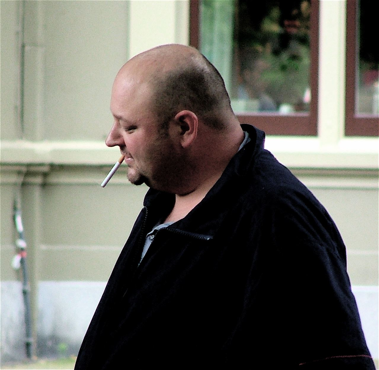 Edo Brunner haalde in 1995 zijn diploma voor de Toneelschool. Na zijn opleiding stortte Edo zich op het acteren. Op de beeldbuis was hij onder meer te zien in "Baantjer", "Grijpstra & De Gier", "Het zonnetje in huis", "De meiden van De Wit", "Kees & Co", "Dunya en Desi", "Toen was geluk heel gewoon" en "Rozengeur & Wodka Lime". Je zou bijna zeggen ‘in welke TV-serie zat hij niet?' Voor BNN scheurde hij rond in een taxi voor het programma "Cash Cab".